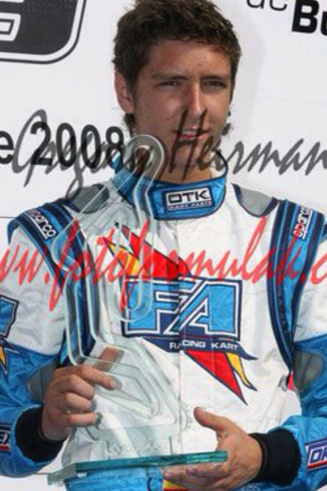 Borja Signes